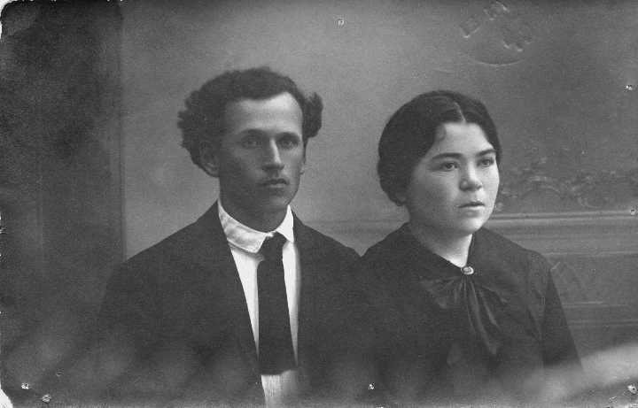 חיותה בוסל ובעלה יוסף בוסל